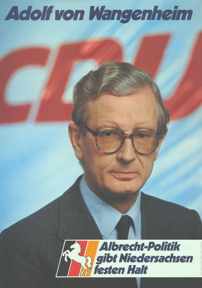 Adolf von Wangenheim CDU Albrecht-Politik gibt Niedersachsen festen Halt Abbildung: Porträtfoto - Nationalfarben mit Niedersachsenross Plakatart: Kandidaten-/Personenplakat mit Porträt Auftraggeber: Verantw.: Niedersachsen-CDU, Hannover Drucker_Druckart_Druckort: Willy F.P. Fehling GmbH, Hannover Objekt-Signatur: 10-008 : 481 Bestand: Landtagswahlplakate Niedersachsen (10-008) GliederungBestand10-18: Landtagswahlplakate Niedersachsen (10-008) » CDU Lizenz: KAS/ACDP 10-008 : 481 CC-BY-SA 3.0 DE